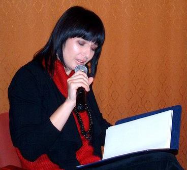 Grażyna Wolszczak, Polish actress